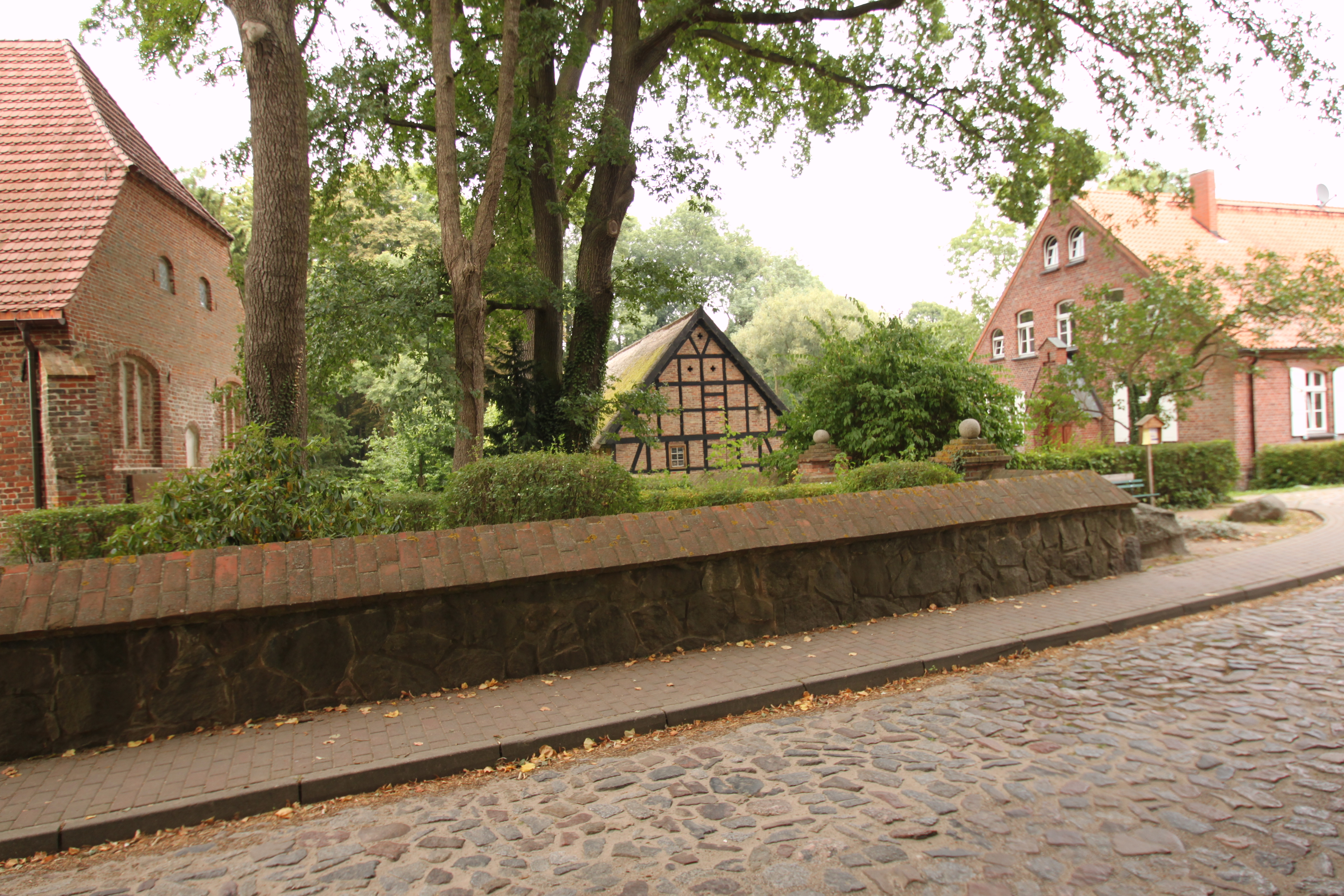 Kirche und Pfarrhaus in Morgenitz